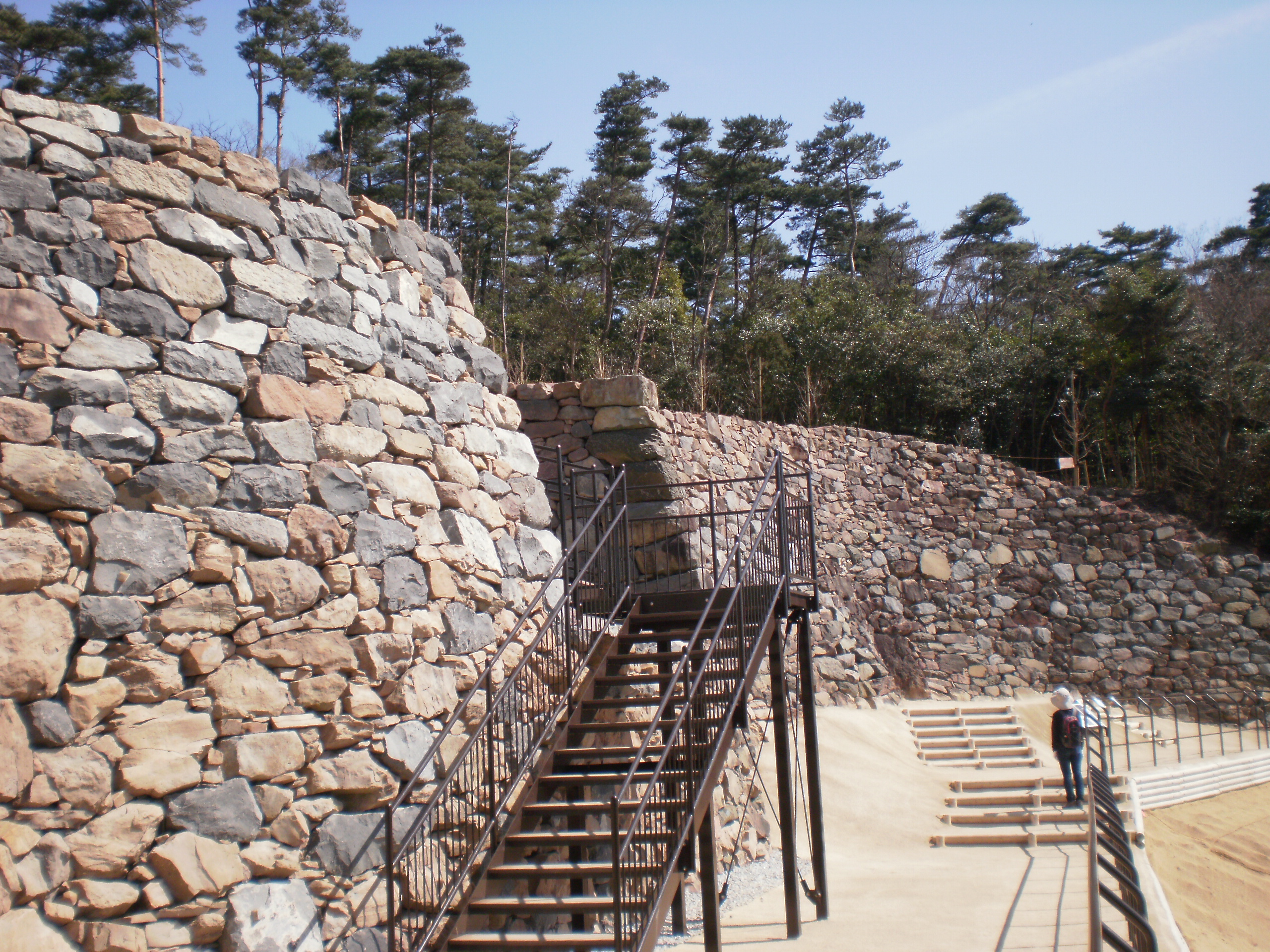 城門跡一般公開 20160317